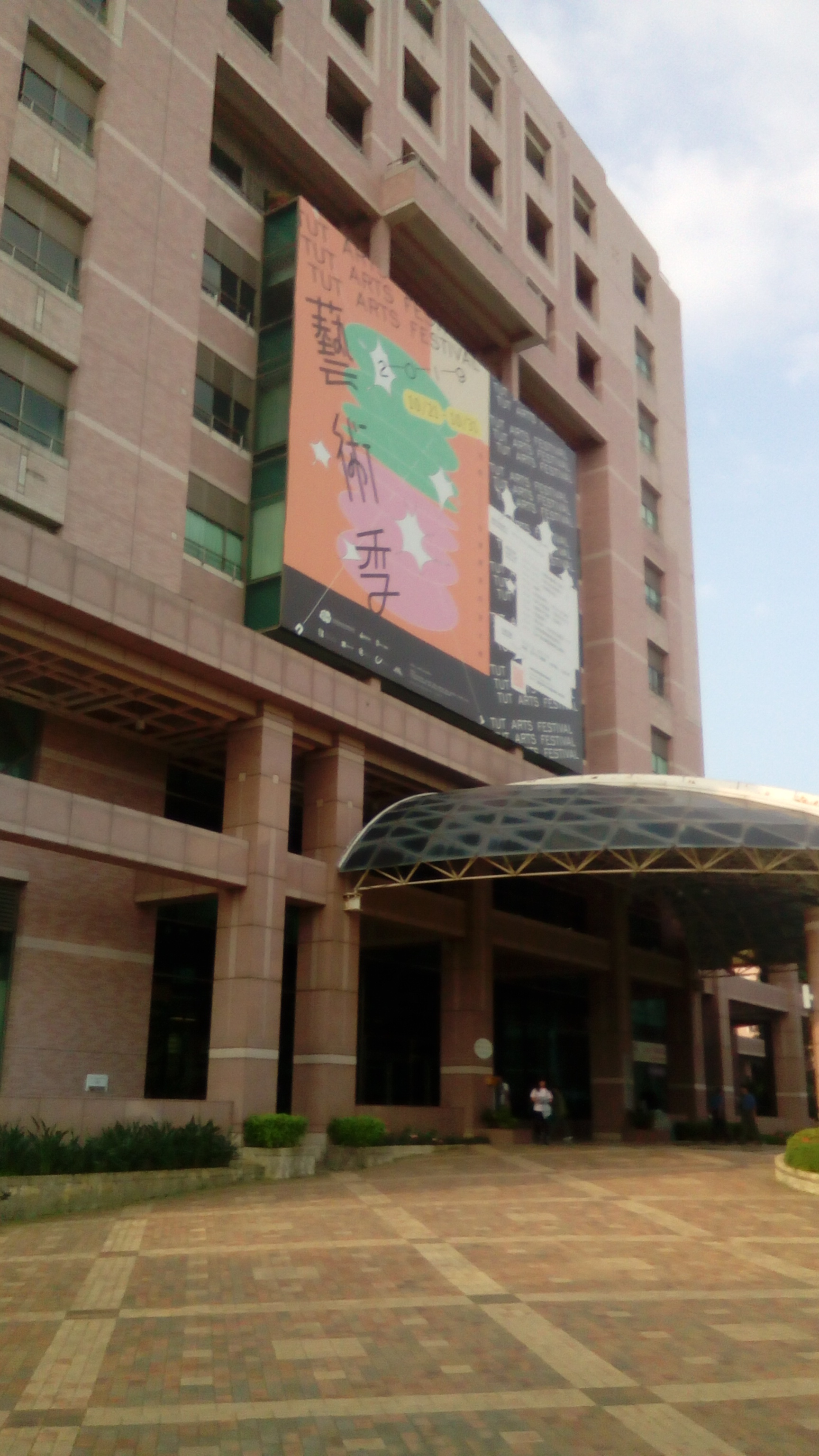 位於校園西側 高十層樓 粉紅色外牆 相當醒目 之前的南女技電話卡即是以此樓做封面